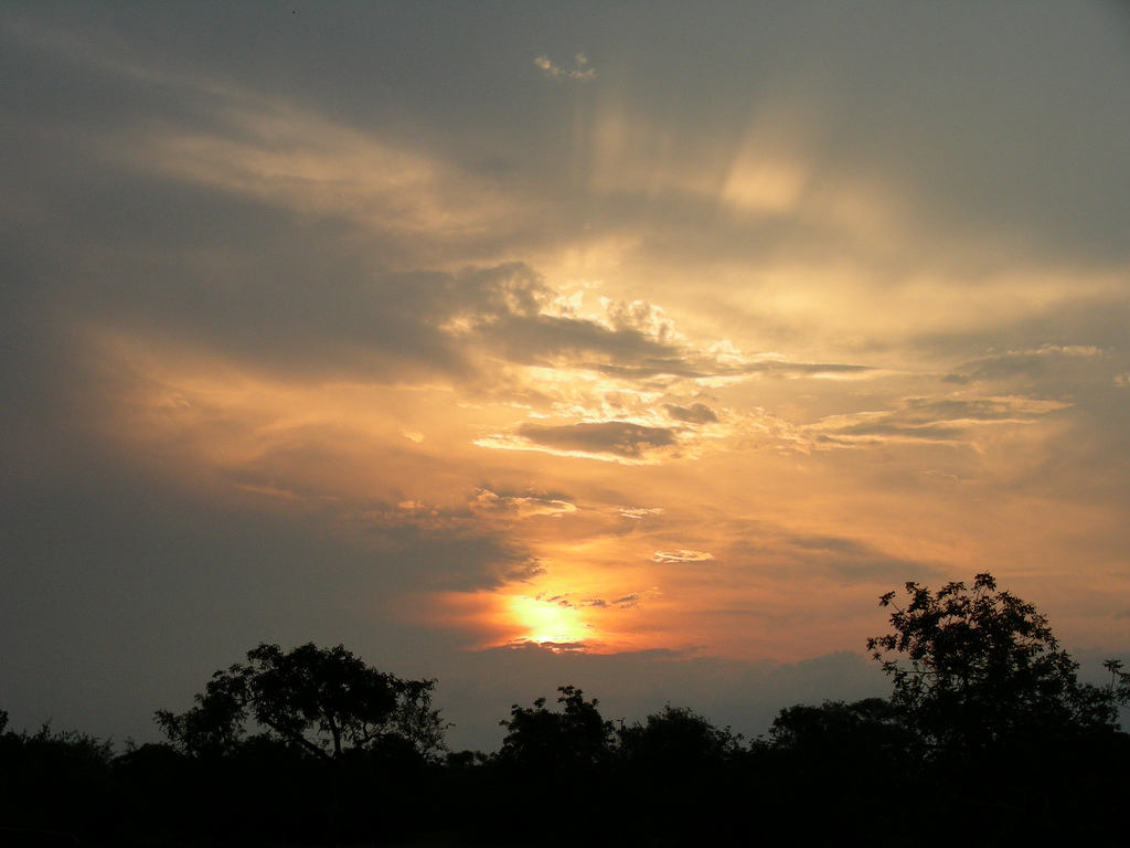 Sunset over Timbavati